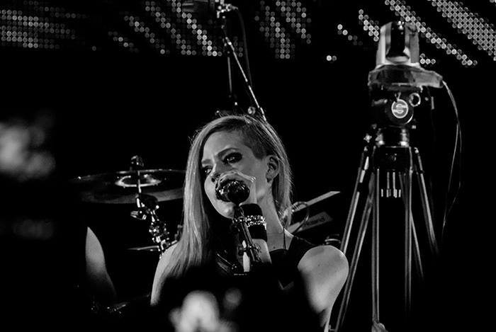 Avril Lavigne in São Paulo in the Avril Lavigne Tour